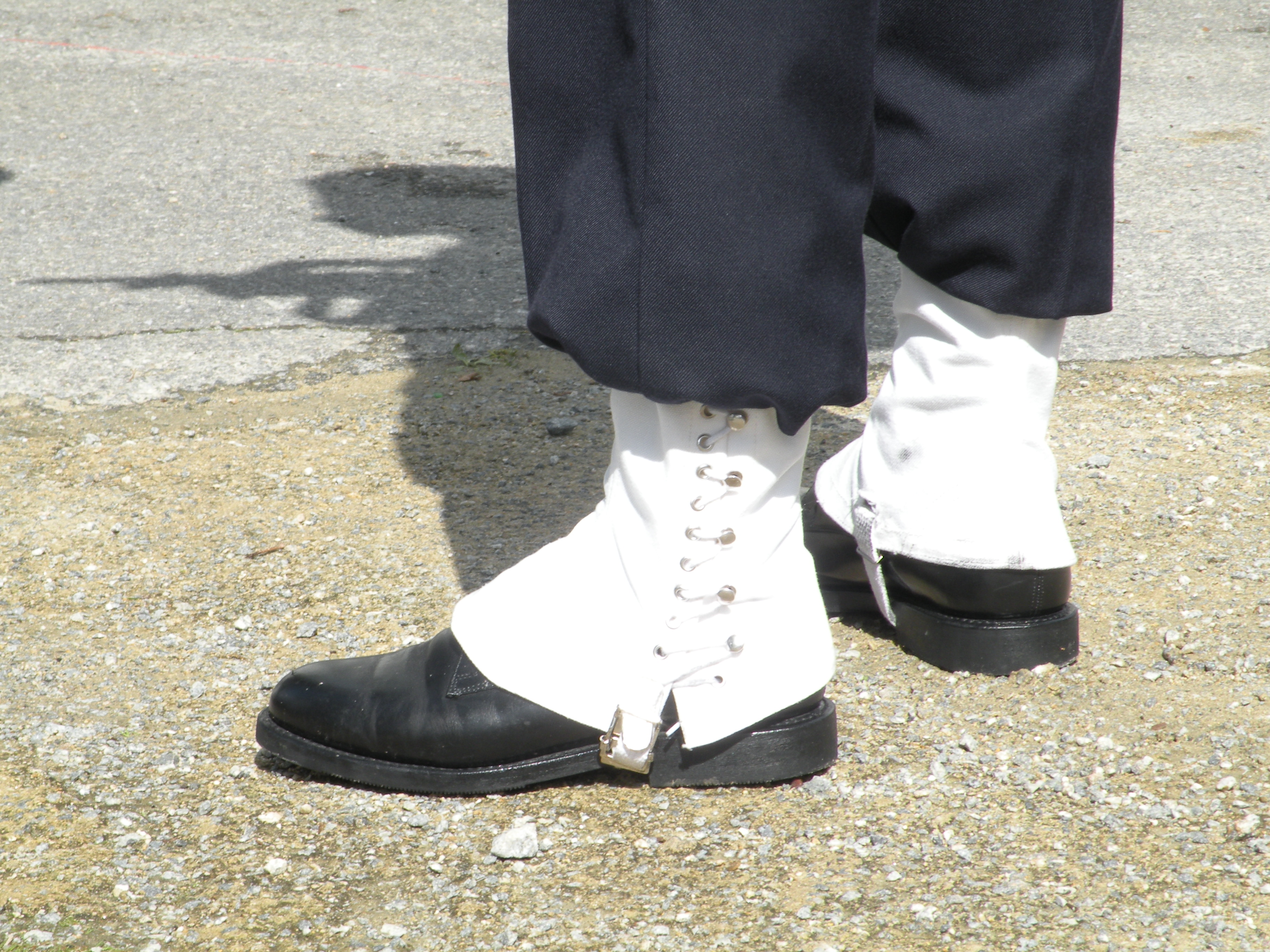 Guêtres d'un mousse, lors du défilé militaire du 14 juillet à Brest sur le cours Dajot.